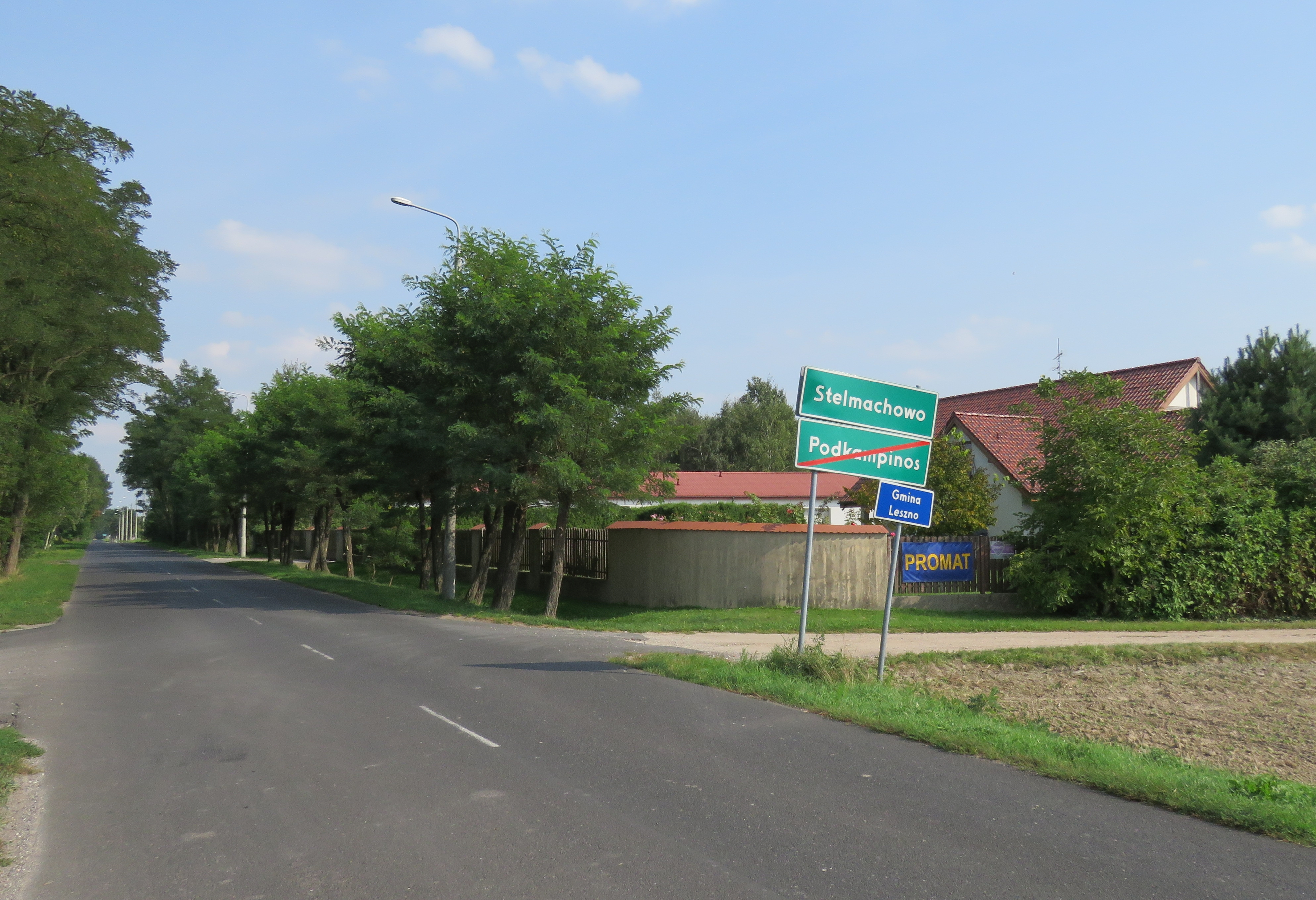 Stelmachowo, gm. Leszno